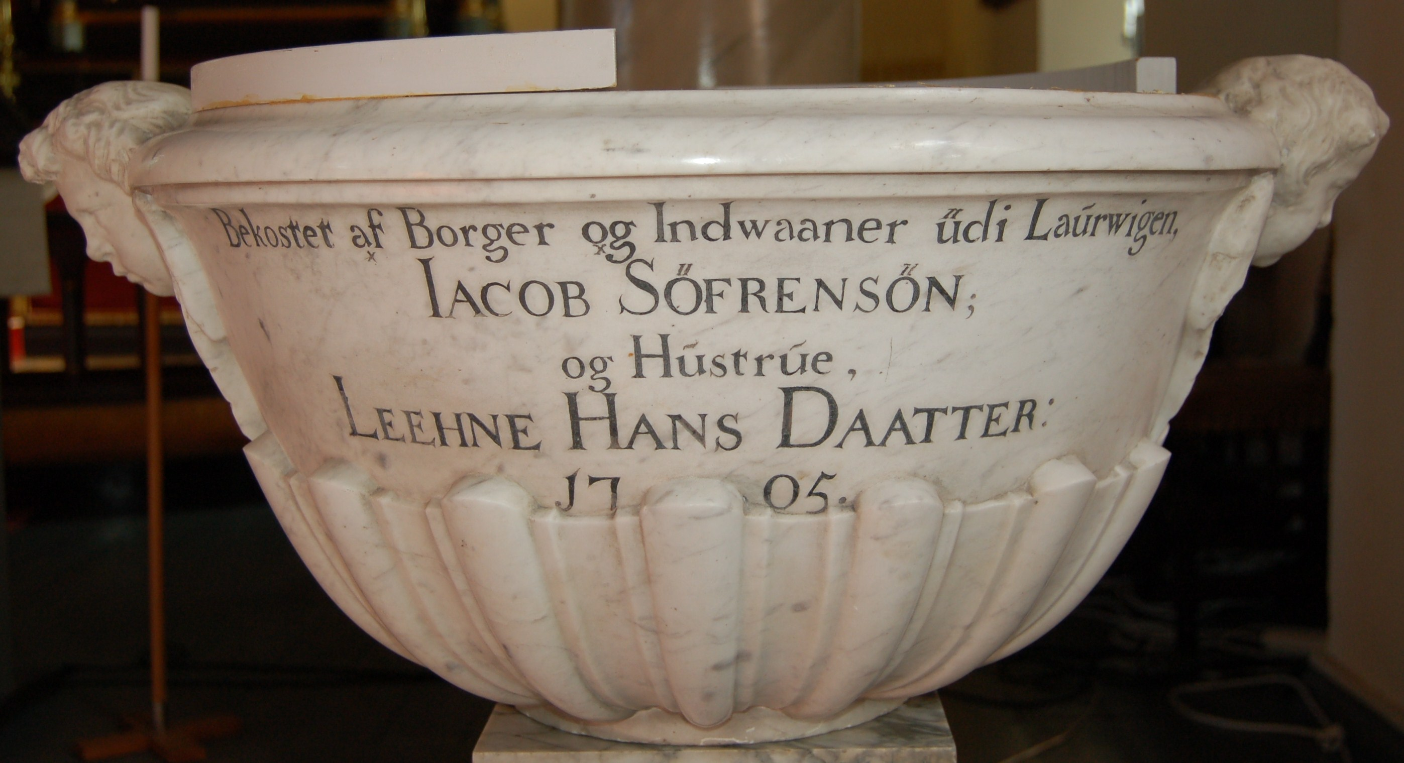 Døpefonten i Larvik kirke, datert 1705 Iacob Søfrensøn og Leehne Hans Daatter.